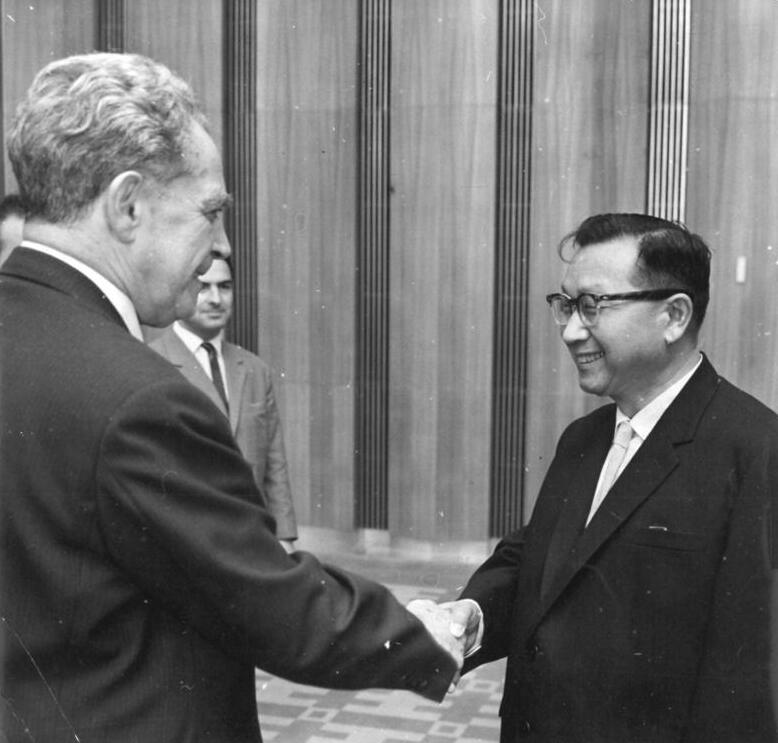 Zentralbild/Spremberg 26.7.1966-Berlin:Koreanische Gäste im Staatsrat Das Mitglied dees Staatsrates der DDR Prof. Hans Rodenberg (links) empfing am 25.7.1966 die gegenwärtig in der DDR weilende Delegation der Obersten Volksversammlung der Koreansichen Volksdemokratischen Republik unter Leitung von Kang Rland UK, Stellvertreter des Vorsitzenden des Präsidiums dieser Volksvertretung (r.) zu einem freundschaftlichen Gespräch, an dem auch Otto Gotsche, Sekretär des Staatsrates und Mitglied des Präsidiums der Volkskammer, Oskar Fischer, Stellvertreter des Ministers für Auswärtige Angelegenheiten der DDR, und der Außerordentliche und Bevollmächtige Botschaft der KVR in der DDR, Kwon Jeng Tae, teilnahmen.